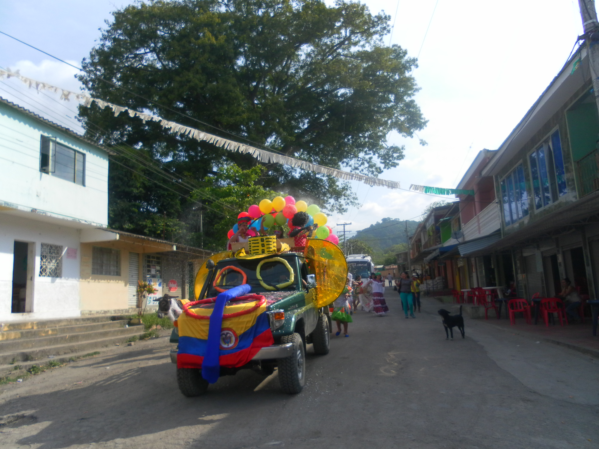 Calle peña negruna (2012)